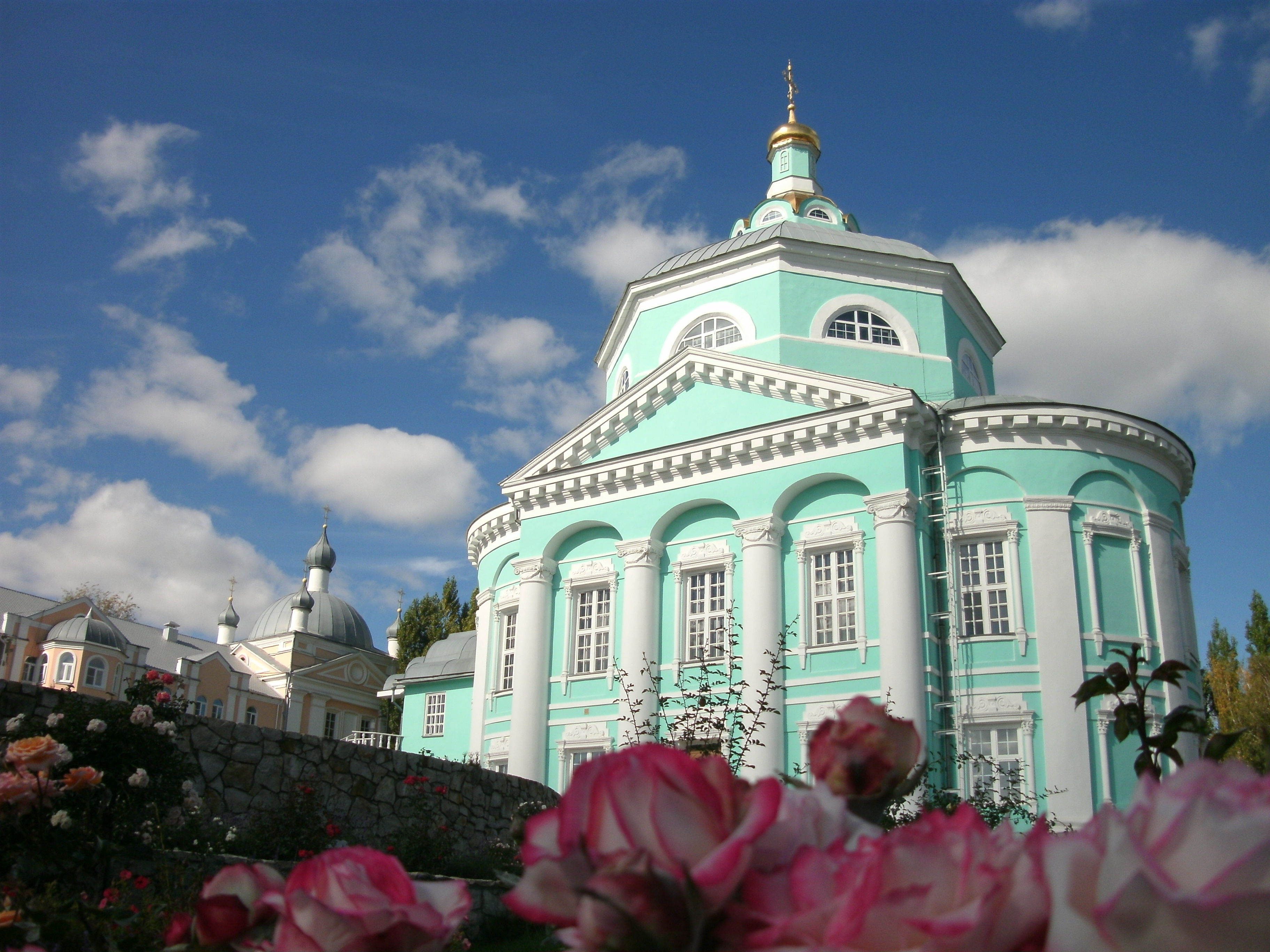 Акатов монастырь в Воронеже. Был основан в 1620 г. игуменом Кириллом на Акатовой поляне